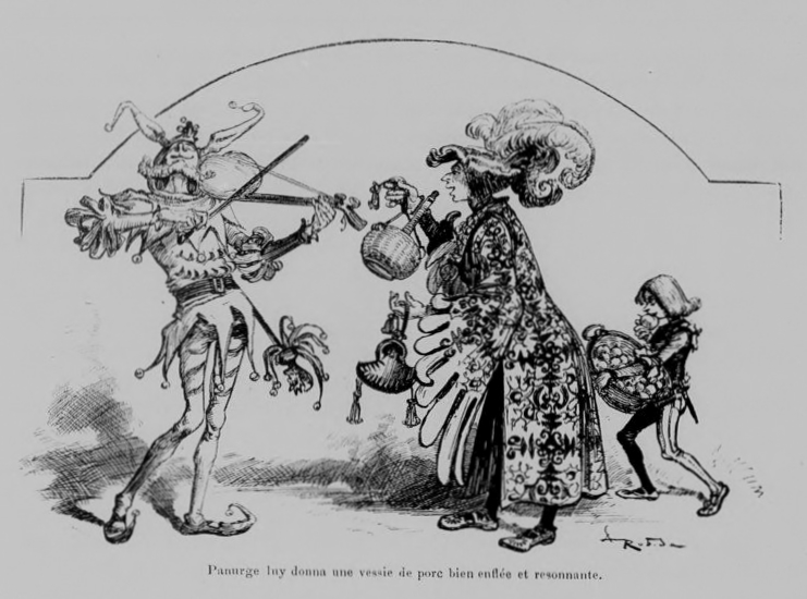 Vignette gravée par Albert Robida pour le chapitre XLV du Tiers Livre de François Rabelais « Comment Panurge se conseille à Triboulet ». Œuvres de Rabelais publiées par la Librairie illustrée (1885), Tome 1,Partie 2